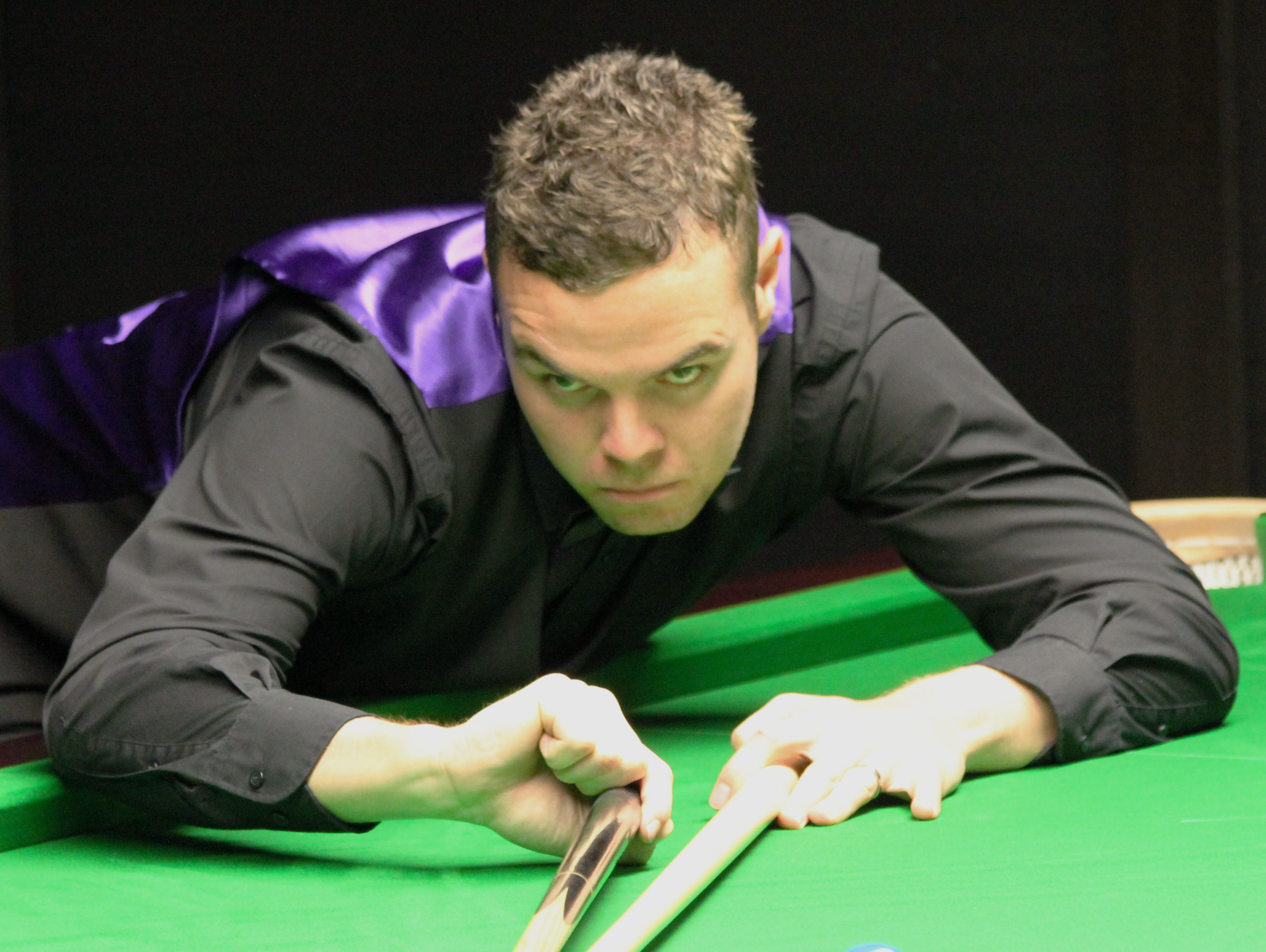 Jamie Cope beim Paul Hunter Classic 2012